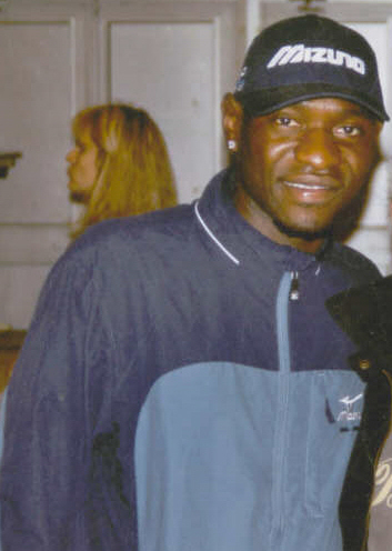 Photo du joueur de football Hérita Ilunga lors de la saison 2005-2006. Cette photo à été prise par Mickaël Roure alias Altrensa pour Wikipédia. Elle ne saurait être utilisée sans la mention de son auteur. D'avance merci.